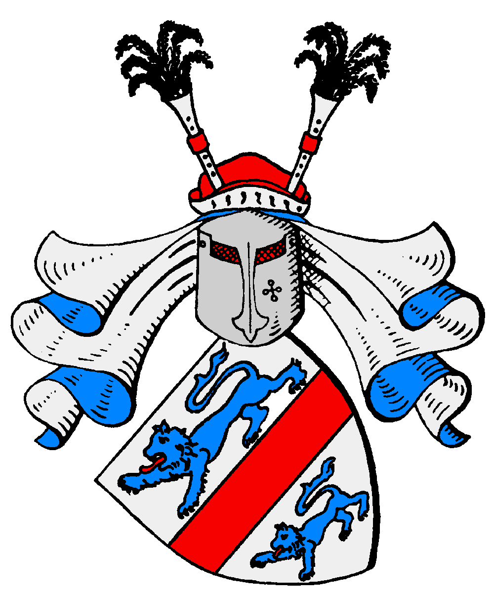 Stammwappen der Schenk von Stauffenberg